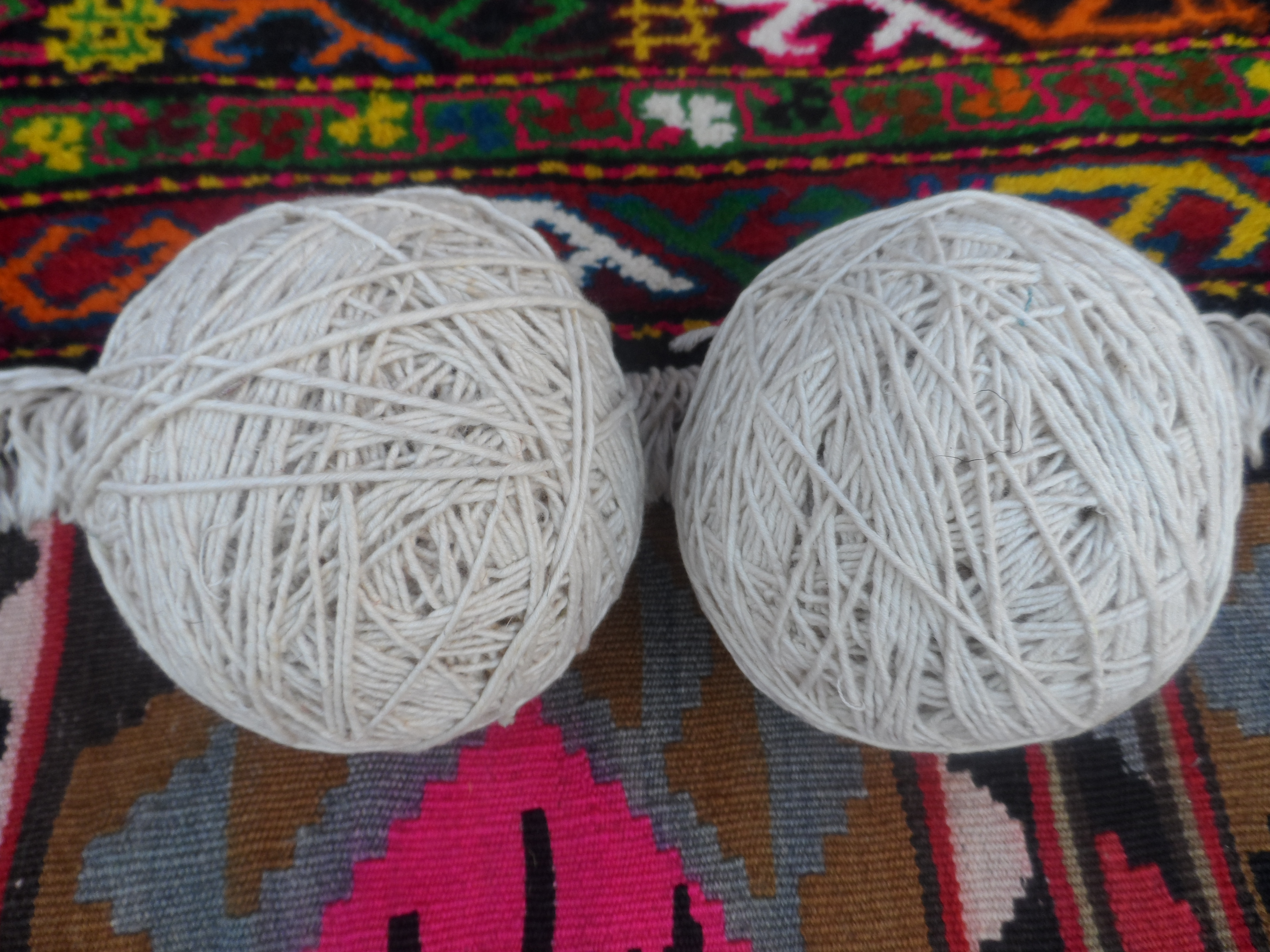 Pambıq Əriş iplik